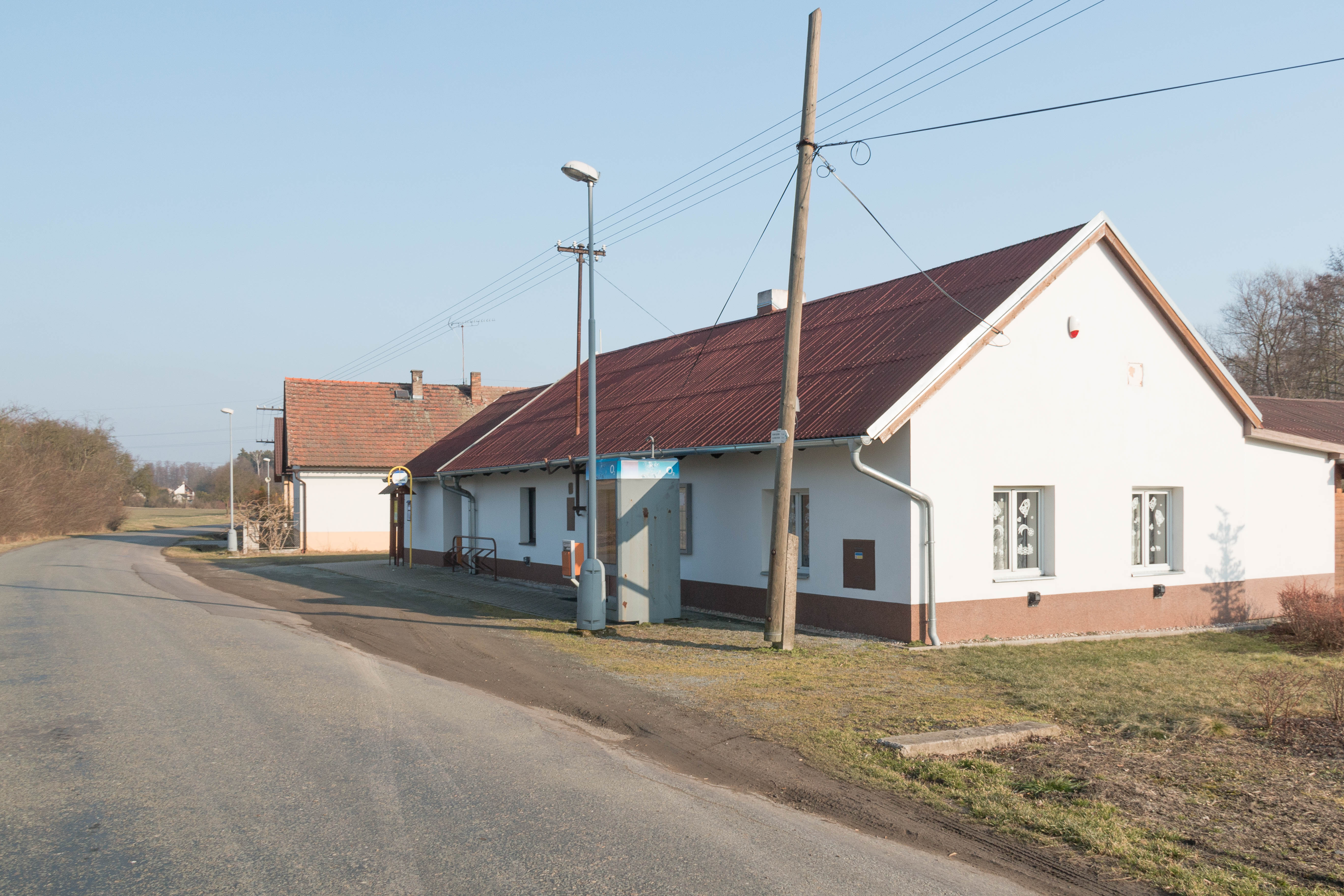 Neratov obecní úřad